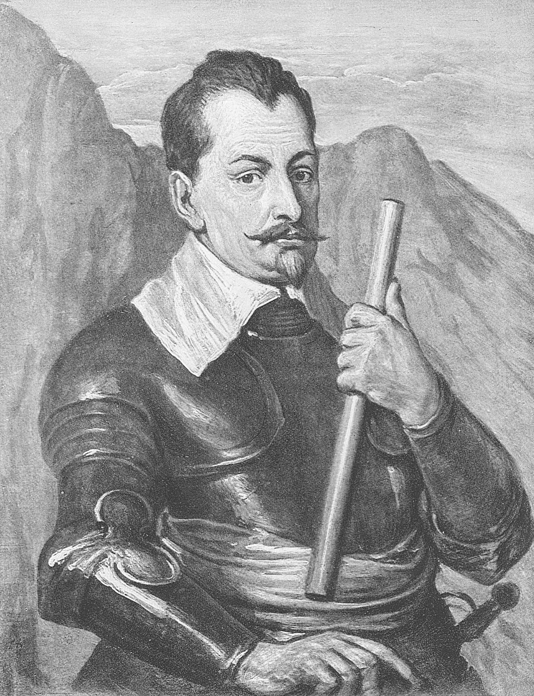 Photographie eines Gemäldes